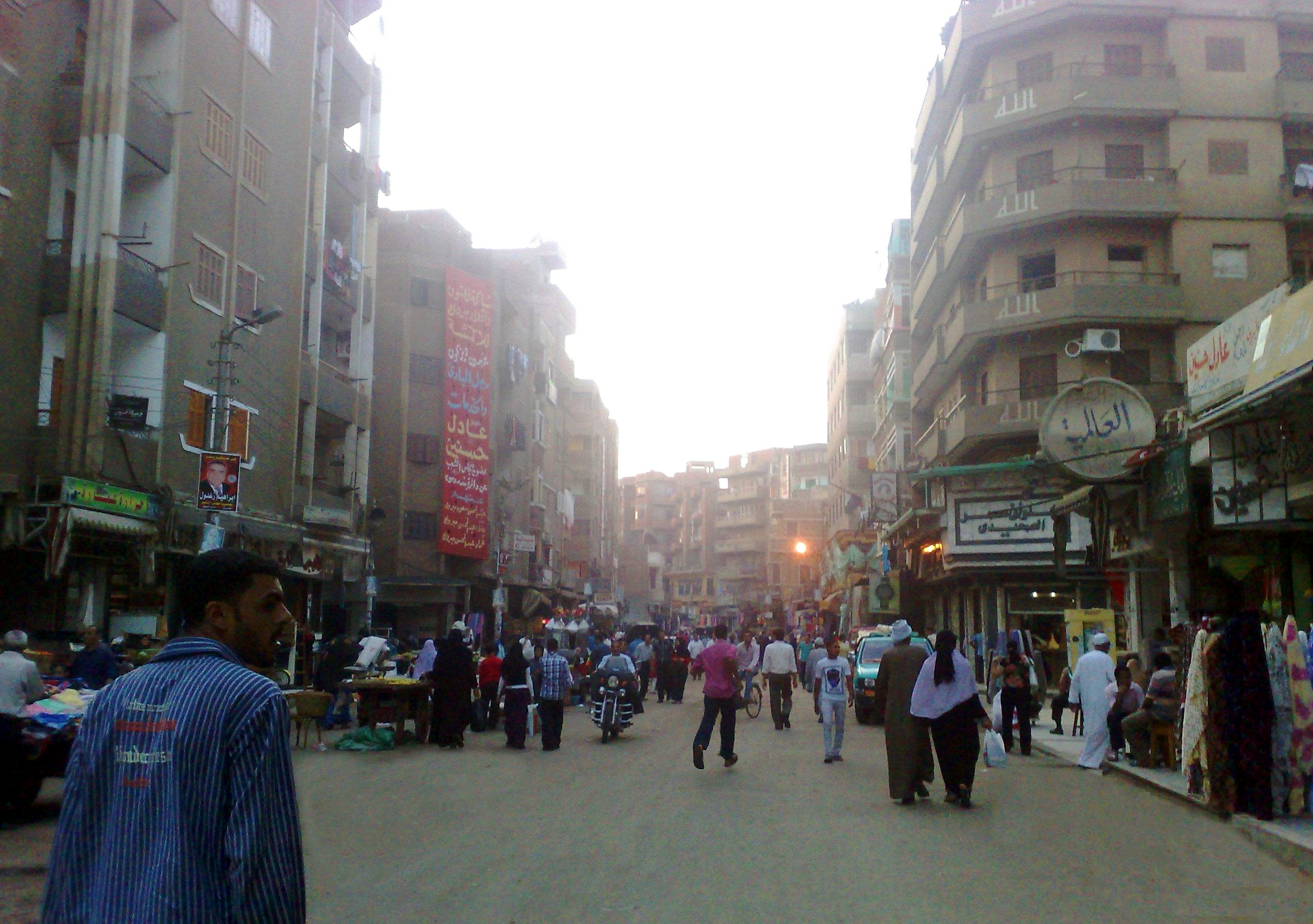 شارع سعد زغلول، دسوق